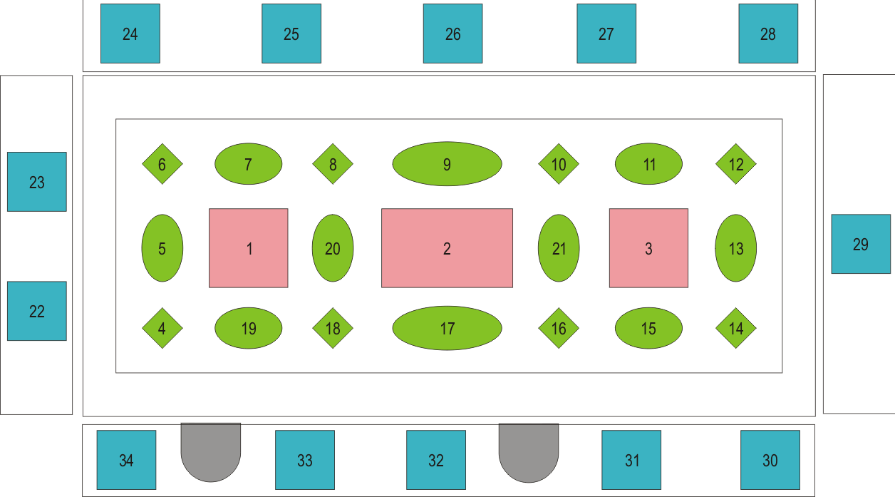 Scuola Grande di San Rocco in Venice, Upper Hall